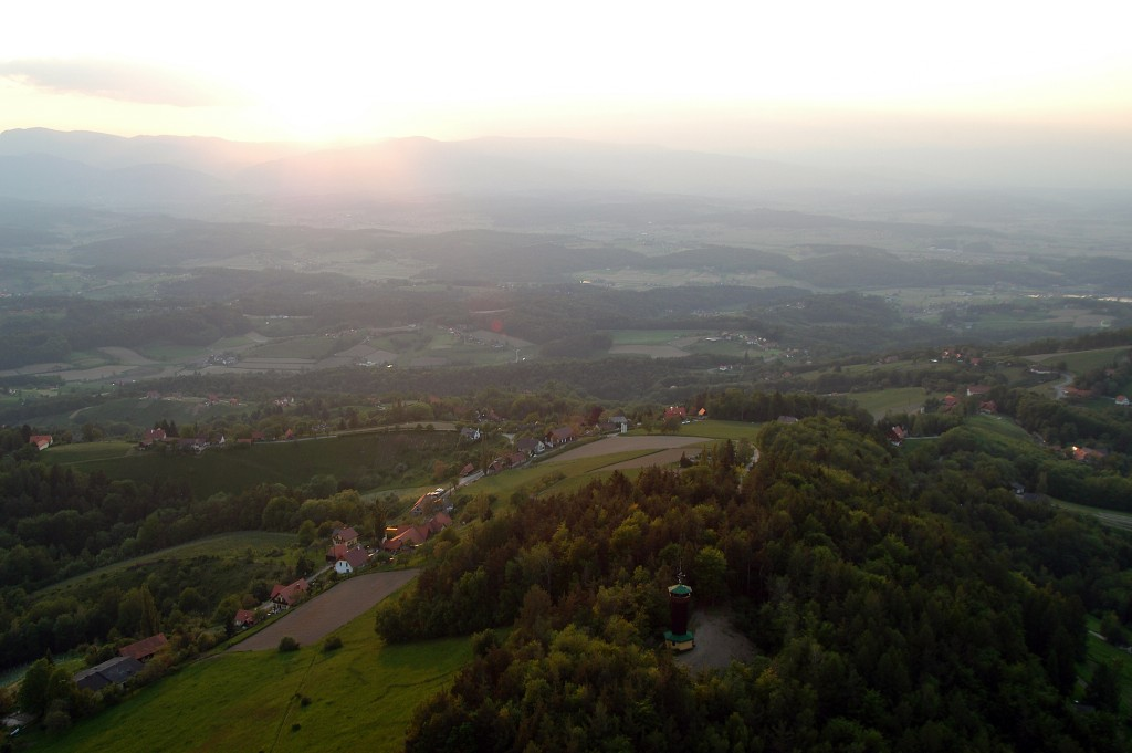 Demmerkogel am Abend